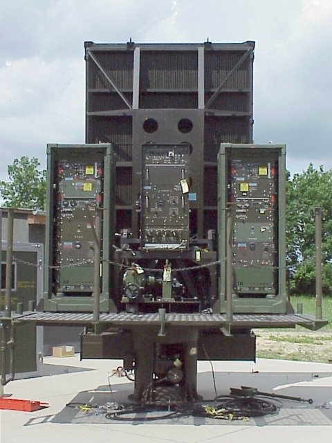 Präzisionsanflugradar auf einem Teststand